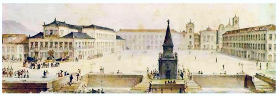 Palace Square (Largo do Paço) in Rio de Janeiro (1834)